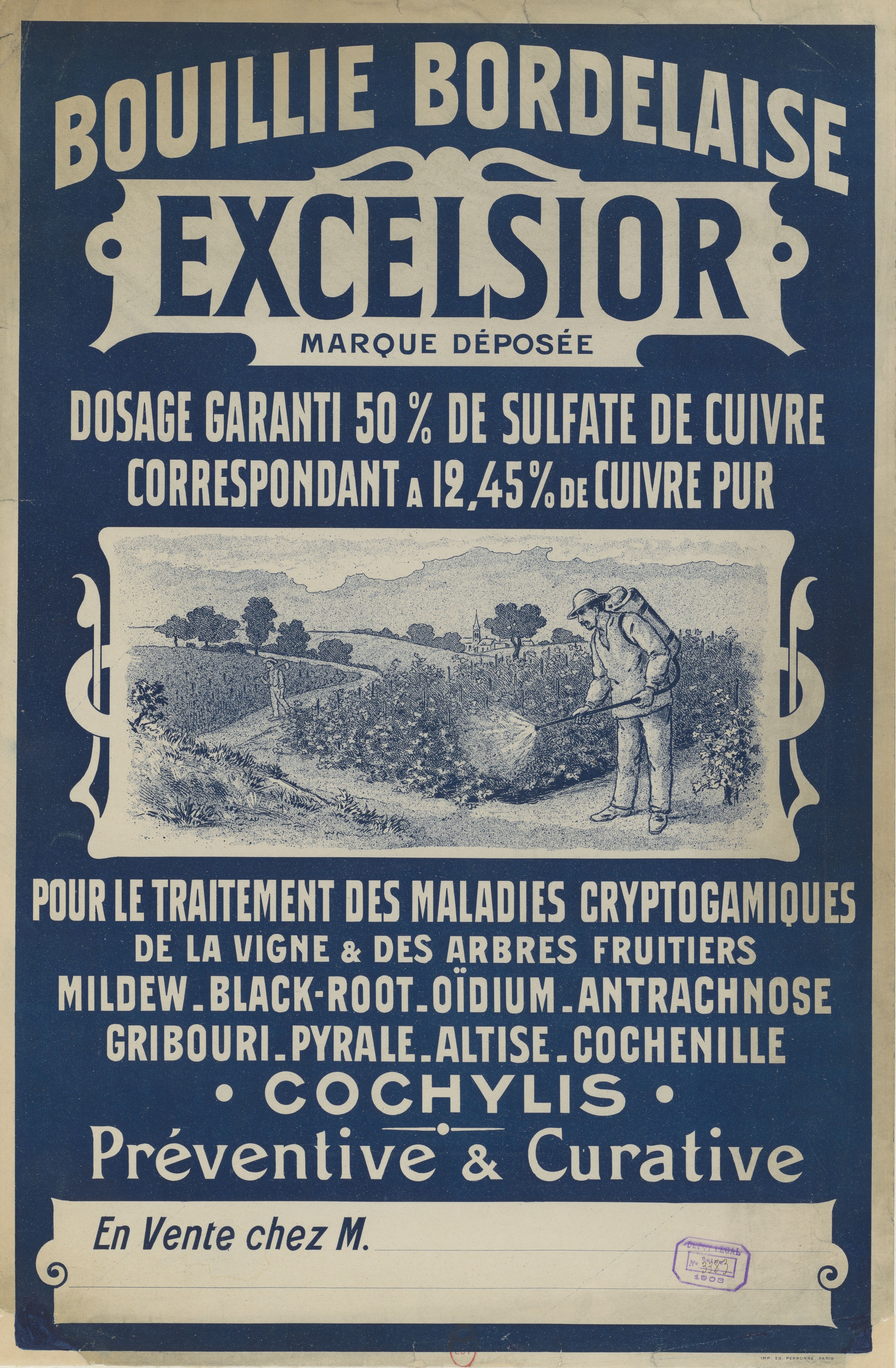 Bouillie bordelaise Excelsior... pour le traitement des maladies cryptogamiques de la vigne et des arbres fruitiers. Affiche.